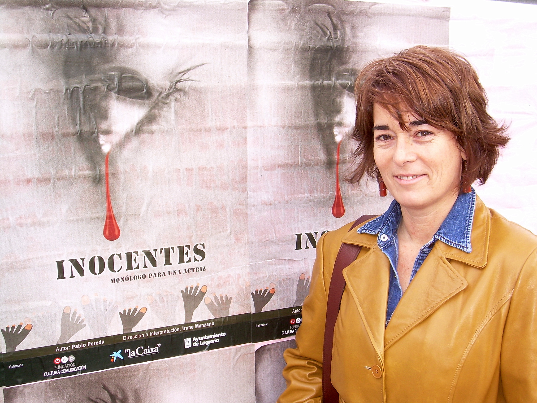 La actriz Irune Manzano antes del estreno de Inocentes -Monólogo para una actriz.